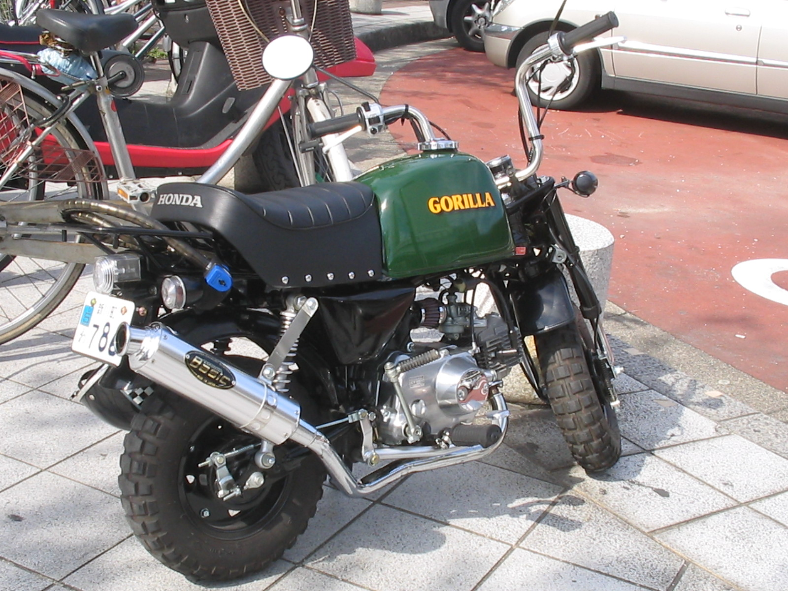 Honda Gorilla, gespot in Nagoya, Japan, 2004